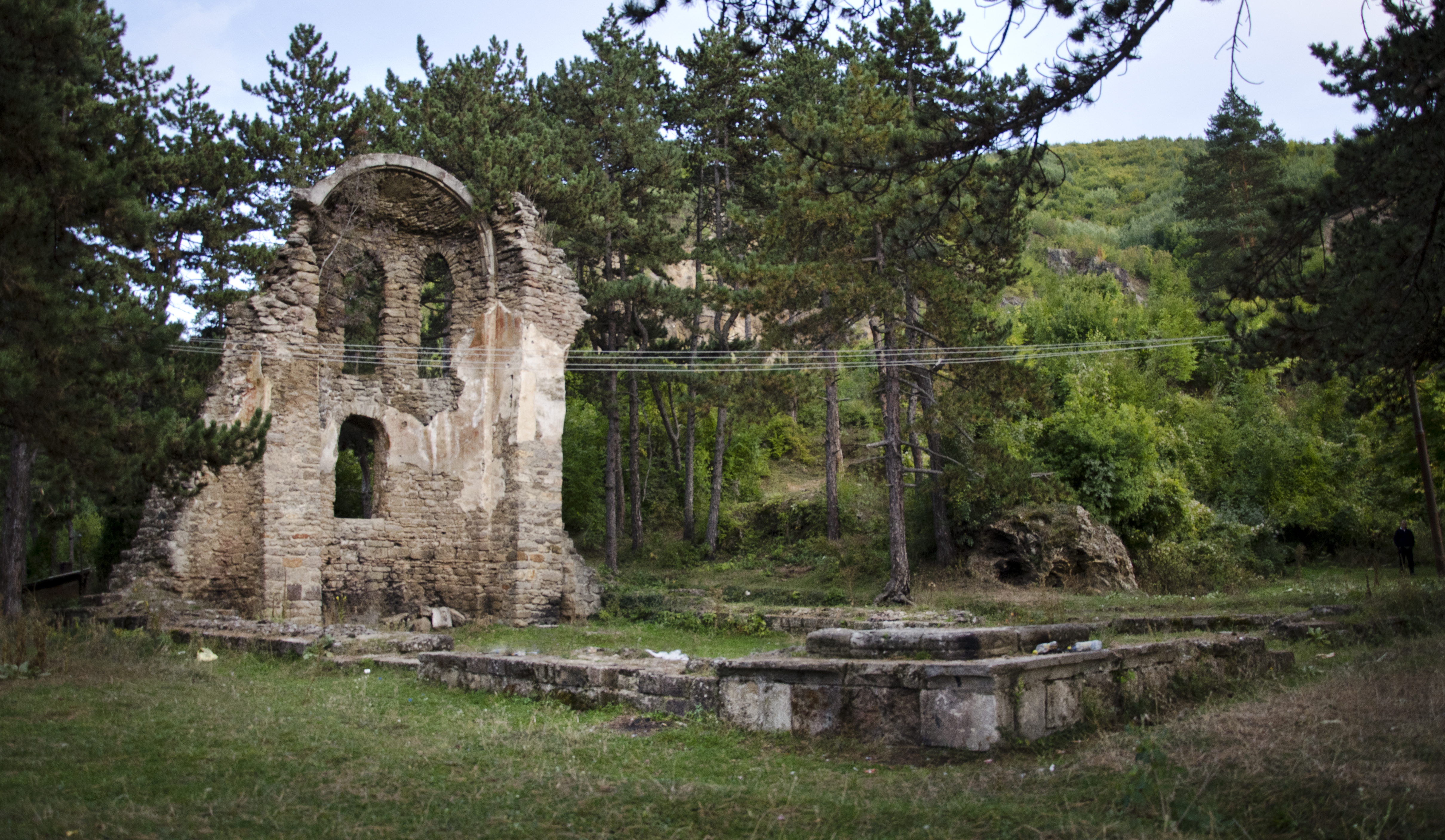 Gërmadhat e Kishës “Latine / Katolike, Sakse”, “Shën Pjetri”” - Ambienturë